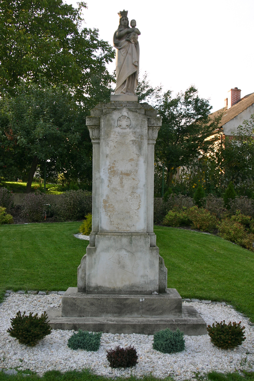 Prężynka – wieś w Polsce położona w województwie opolskim, w powiecie prudnickim, w gminie Lubrza.